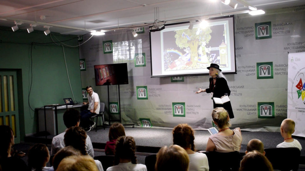 Вікторія Ковальчук в часі доповіді на науковому круглому столі в часі фестивалю